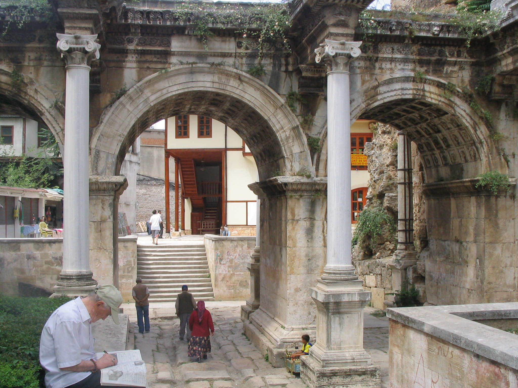 Antalya, Hadrianstor, Mittelteil